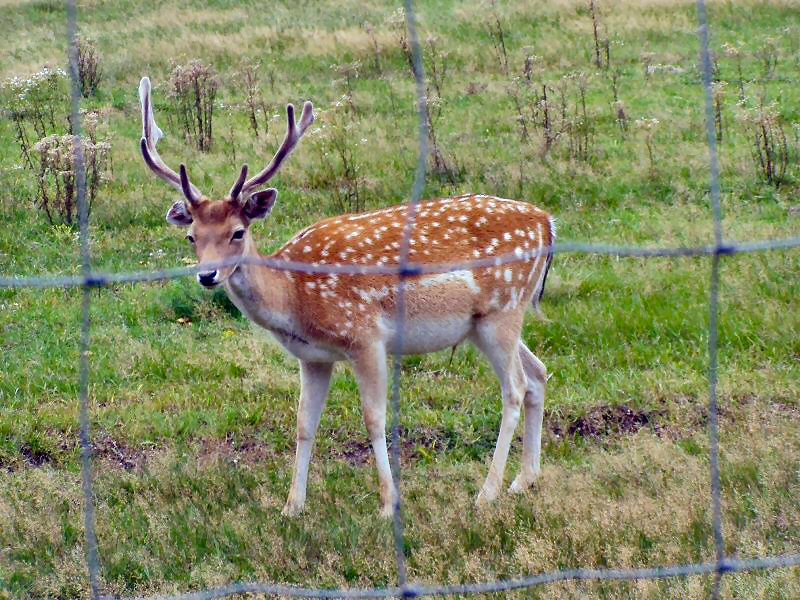 Hodowla danieli w Bronkowie